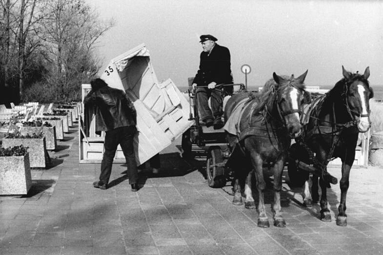 ADN-ZB Martin-22.4.83-ma-Bez. Rostock: Sommersaison kündigt sich an- Im Ostseebad Kühlungsborn wurden die ersten Strandkörbe bereitgestellt. In Kürze werden sie die Strandpromenade bereits wieder verlassen und ihre Nutzer in unmittelbarer Seenähe finden.